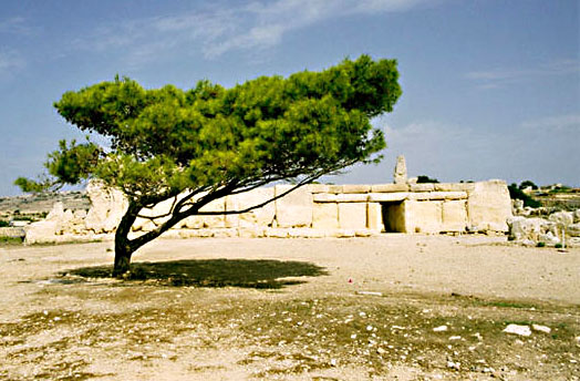 Hagar Qim Temples, Malta